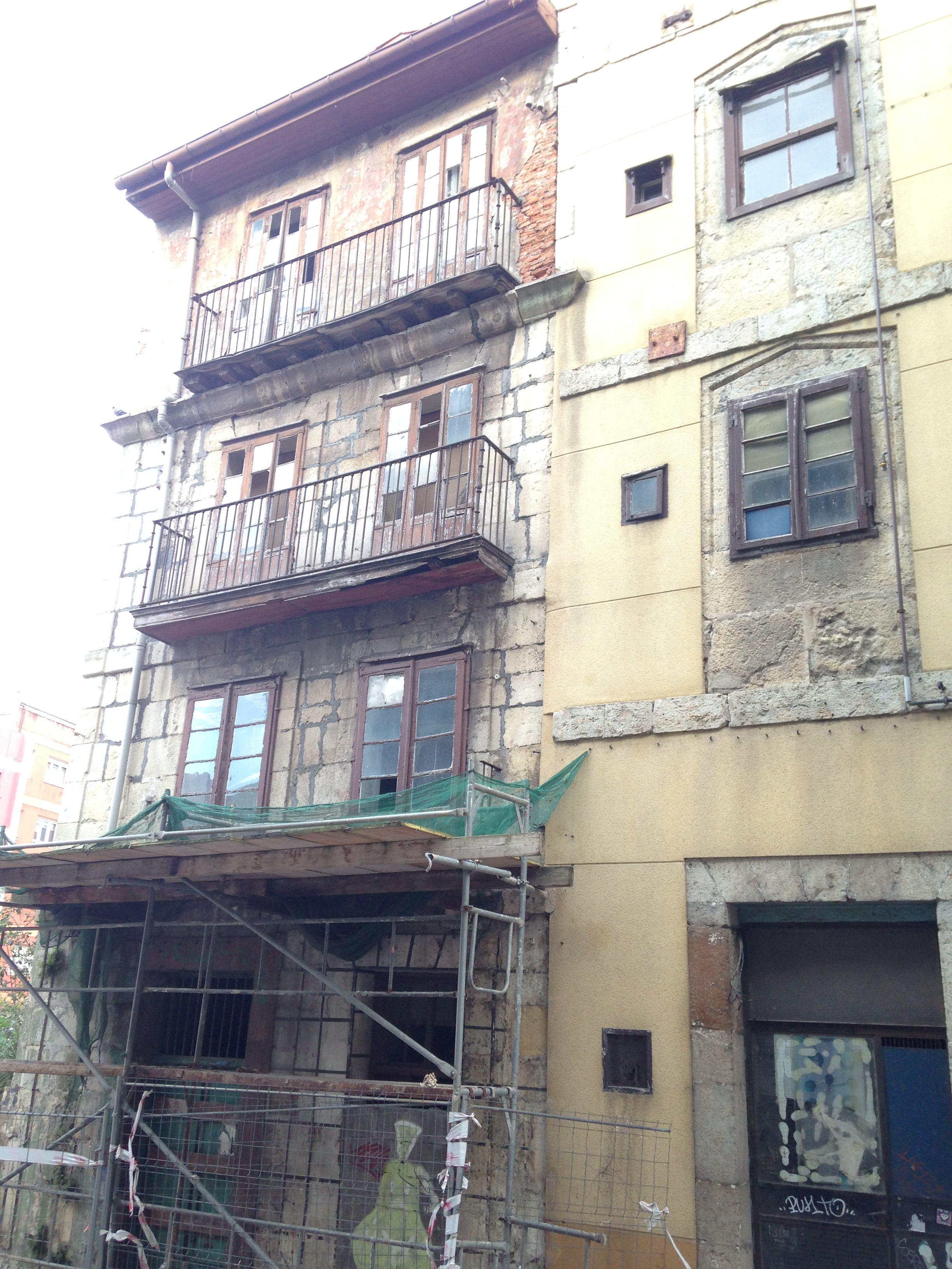 Edificio historico amenazado de ruina en Santander, España